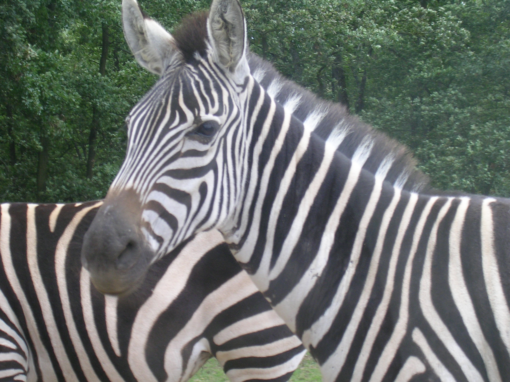 Photo de Zebre au Safari de Peaugres Picture of a Zebra from Peaugres.